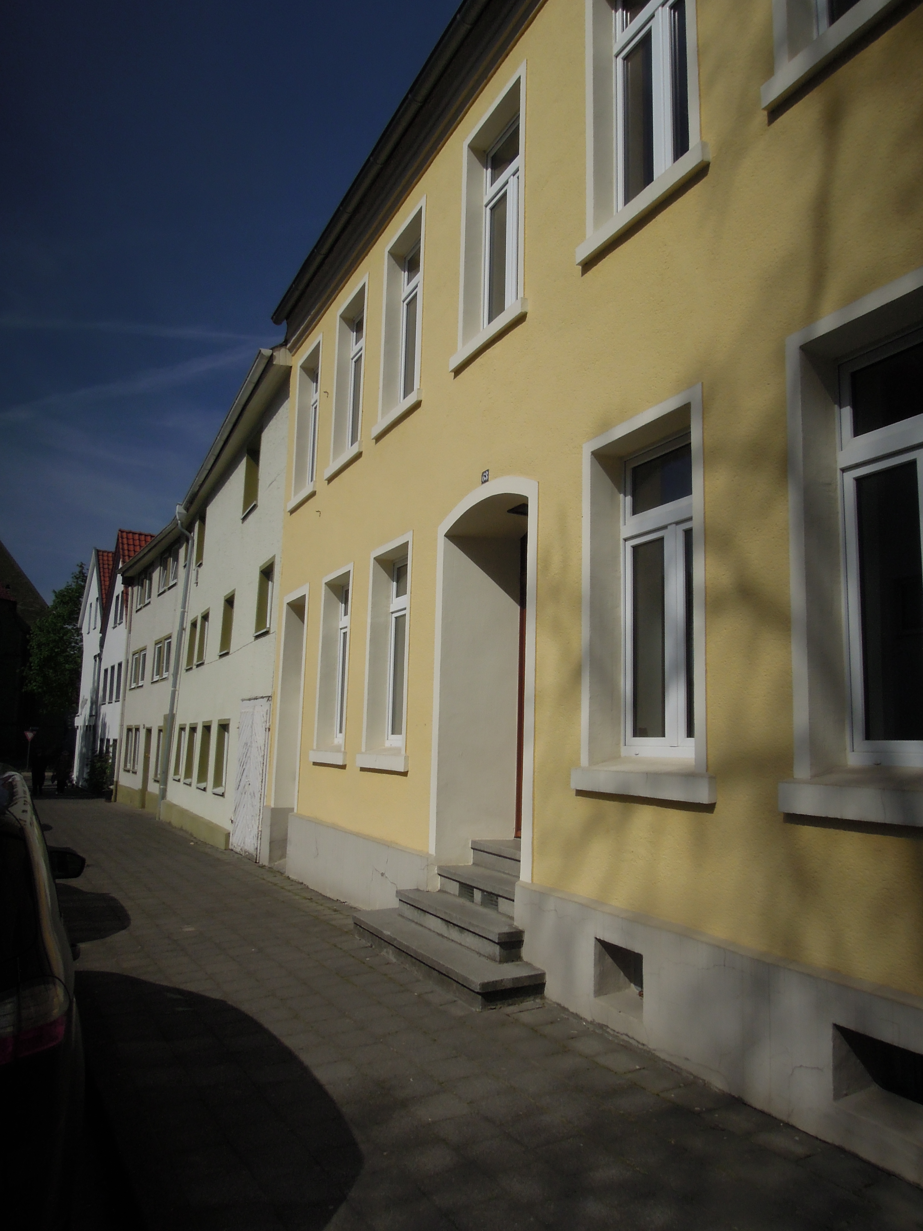 Stolpersteinlage Soest Thomästraße 63